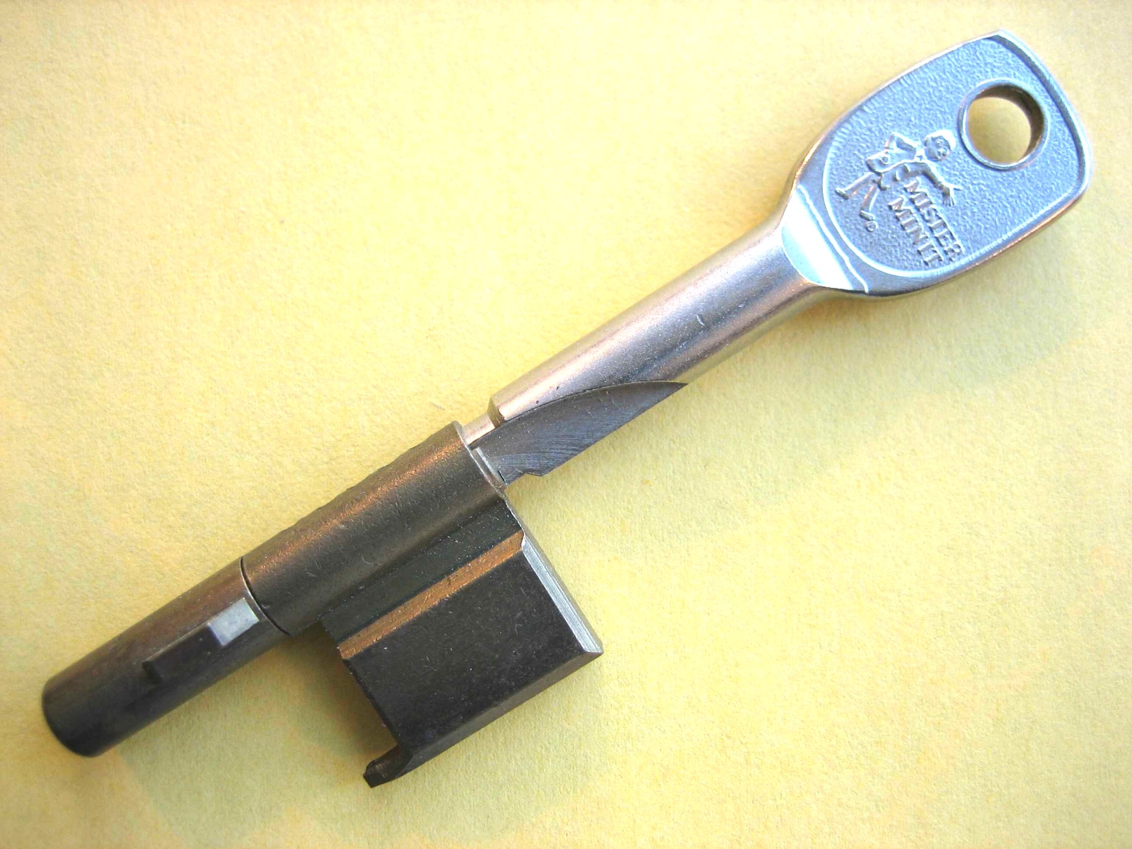 Steckschloss geschlossen